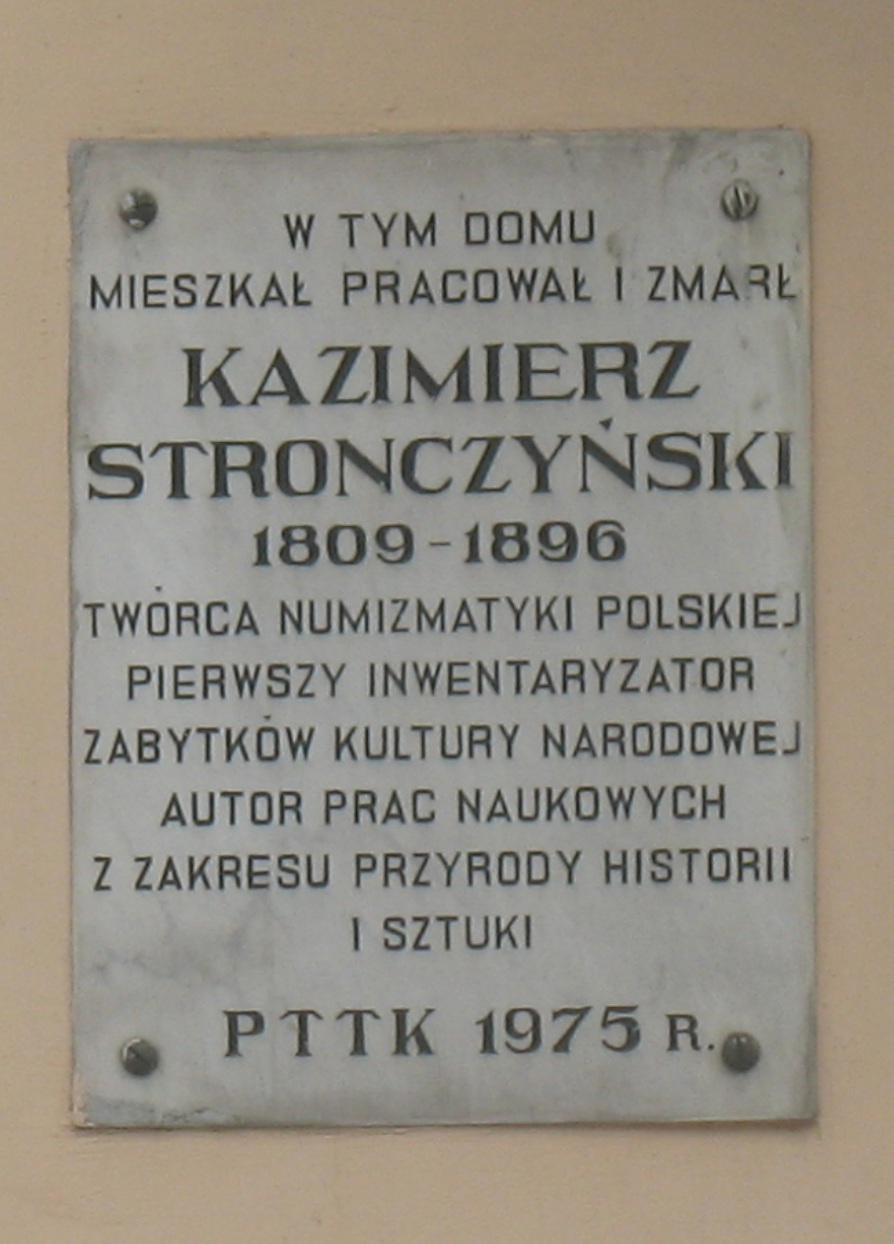 Tablica upamiętniająca Kazimierza Stronczyńskiego